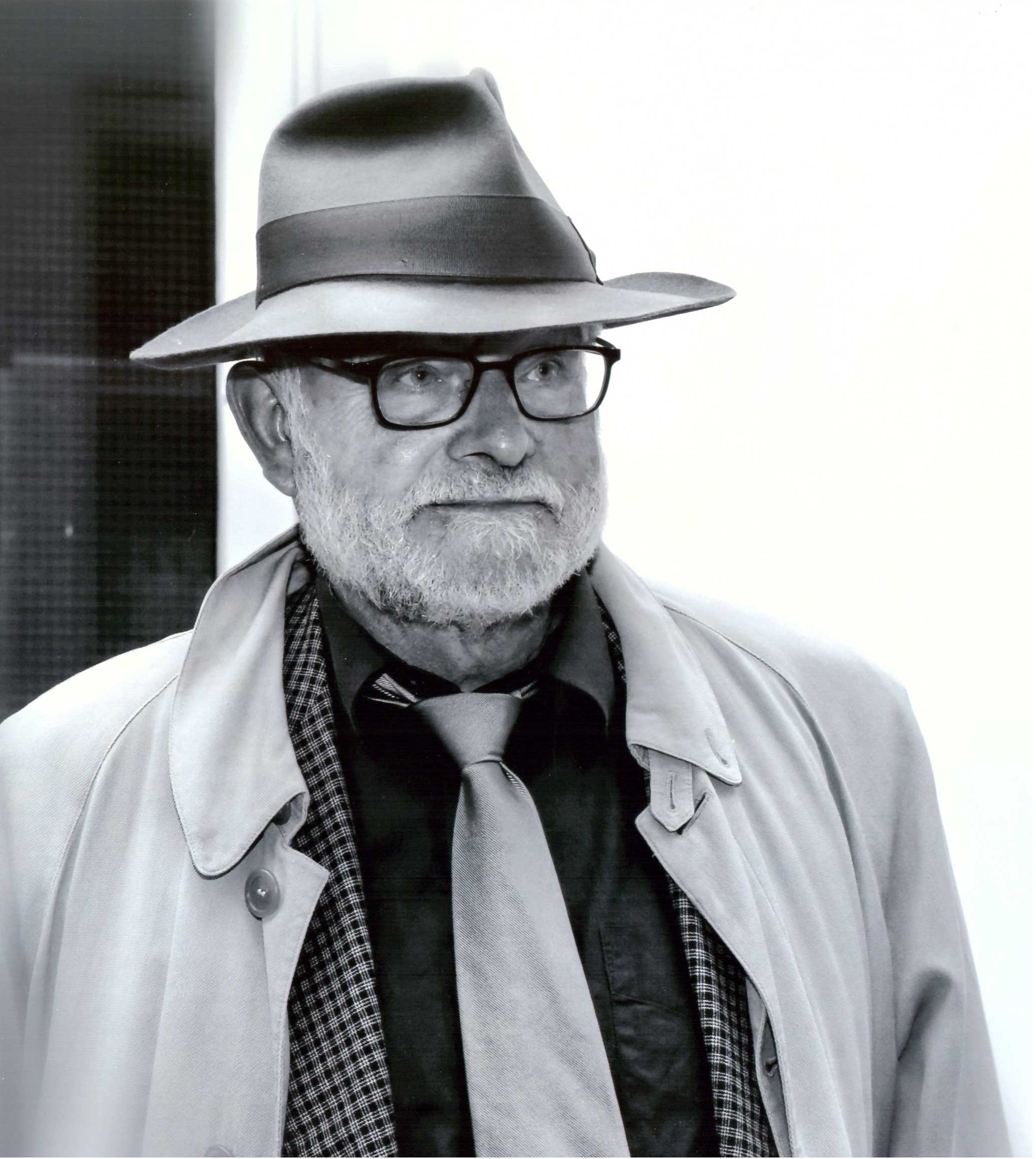 Datum der Aufnahme: 01.11.2016 Haus der Wissenschaft, Braunschweig